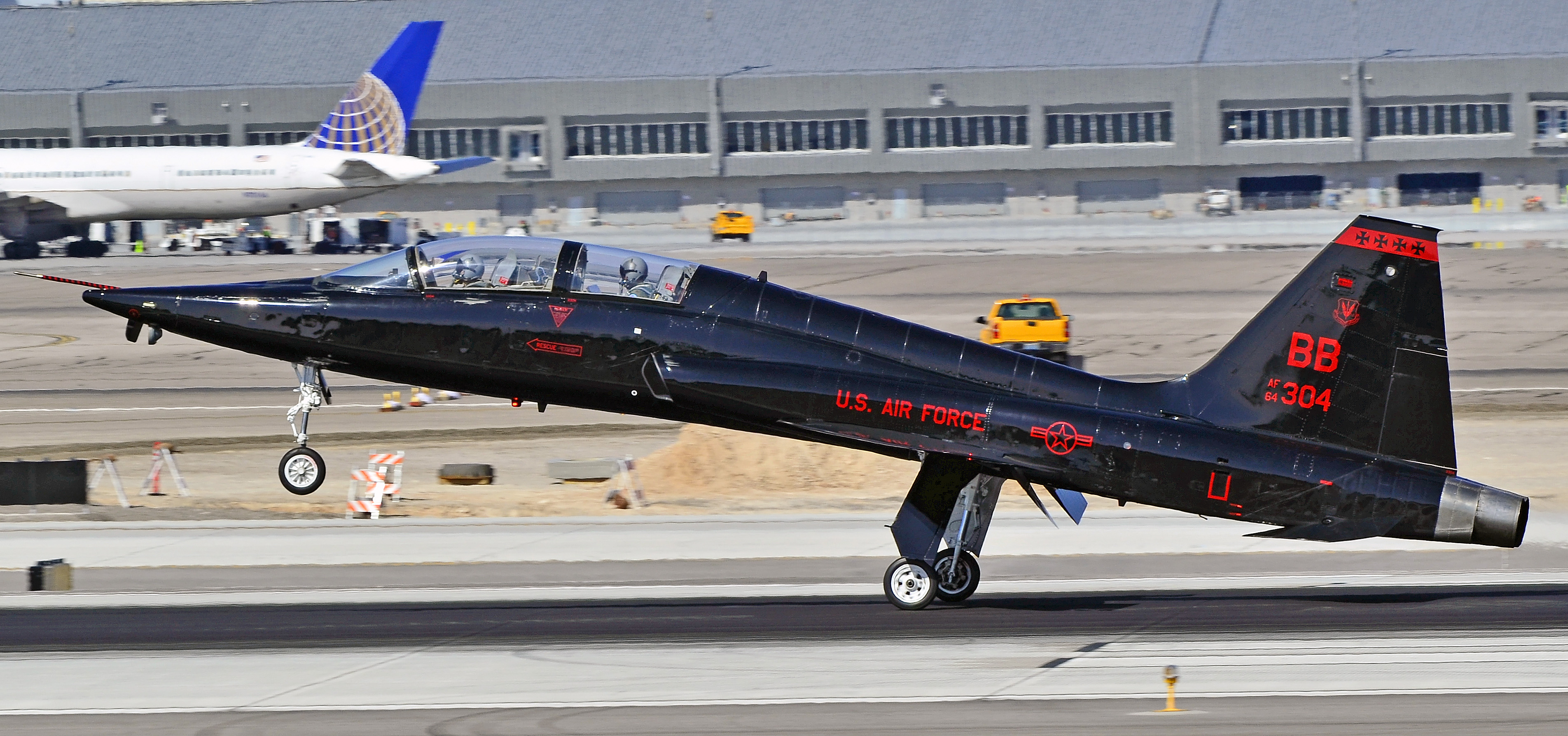 Las Vegas - McCarran International (LAS / KLAS) USA - Nevada, March 03, 2011 Photo: Tomás Del Coro